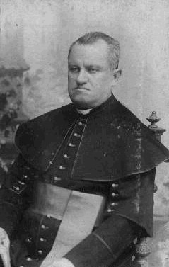 Jan Pánek (1842 - 1899), Český římskokatolický kněz a profesor.